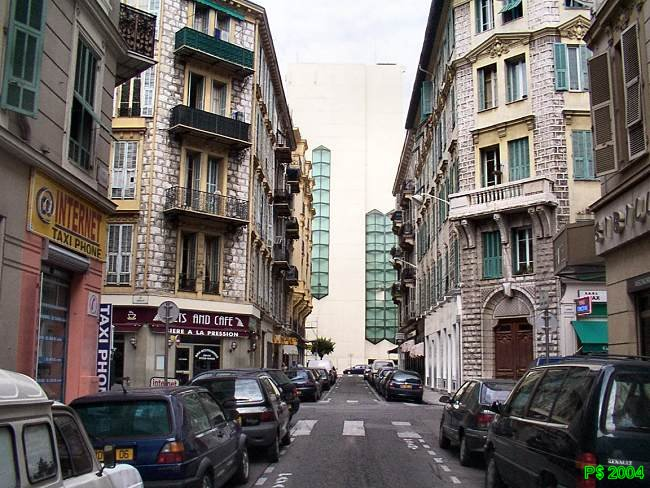 4 Rue Saint Siagre, direction N vers le Bd Raimbaldi. Au fond, une tour-parking automatisée (accès public interdit) construite avec dérogation de hauteur de la ville: une solution alternative à la construction difficile de parkings souterrains dans ce quartier.